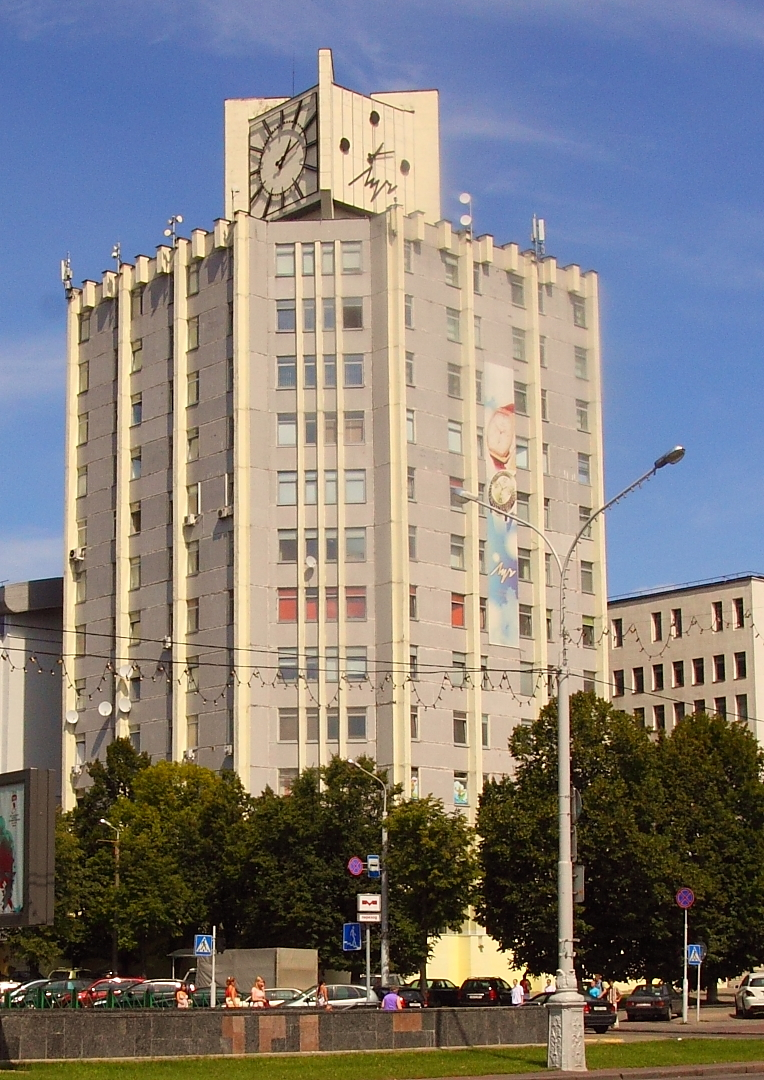 Центральная башня Минского часового завода "Луч" (Минск, Беларусь)